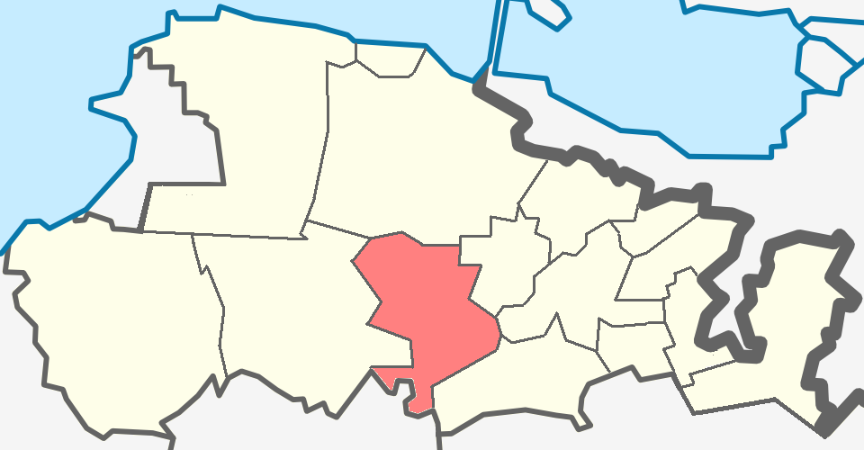 Гостилицкое сельское поселение Ломоносовского района Ленинградской области.